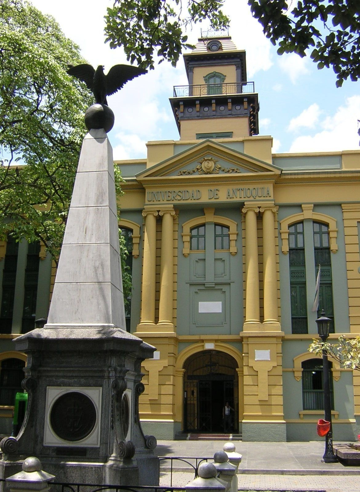 Monumento en conmemoración del centenario de la UdeA. ubicado en la Plazuela San Ignaco, Medellín, Colombia.